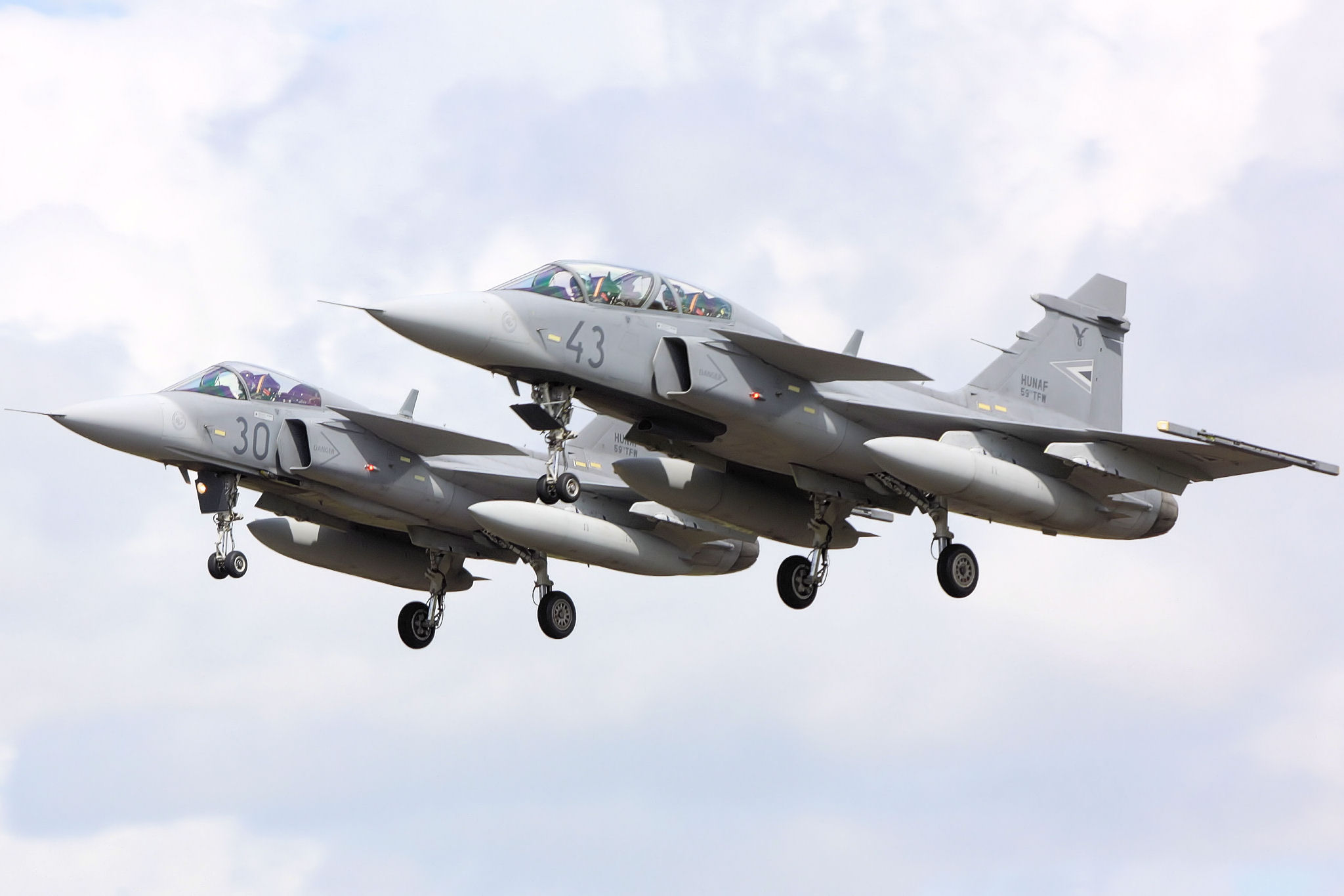 Gripen - RIAT 2009